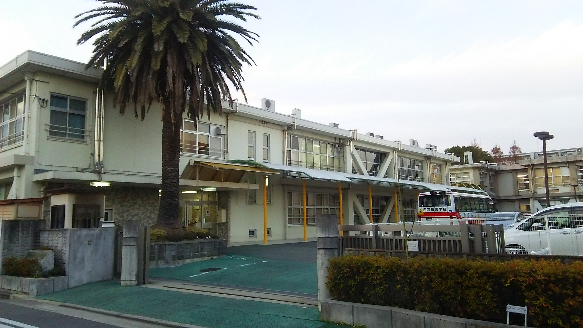 校門の外から撮影